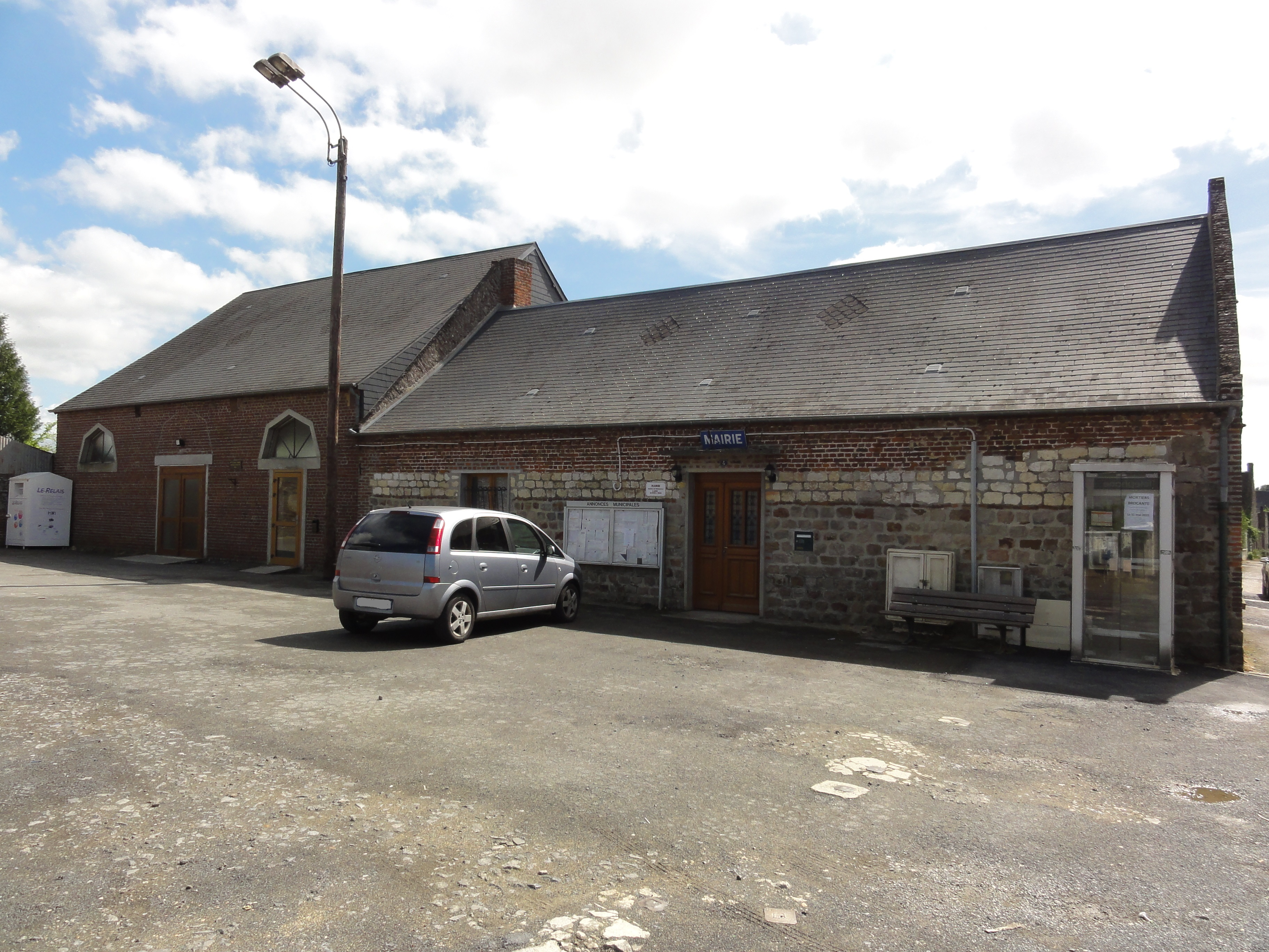 Dercy (Aisne) mairie